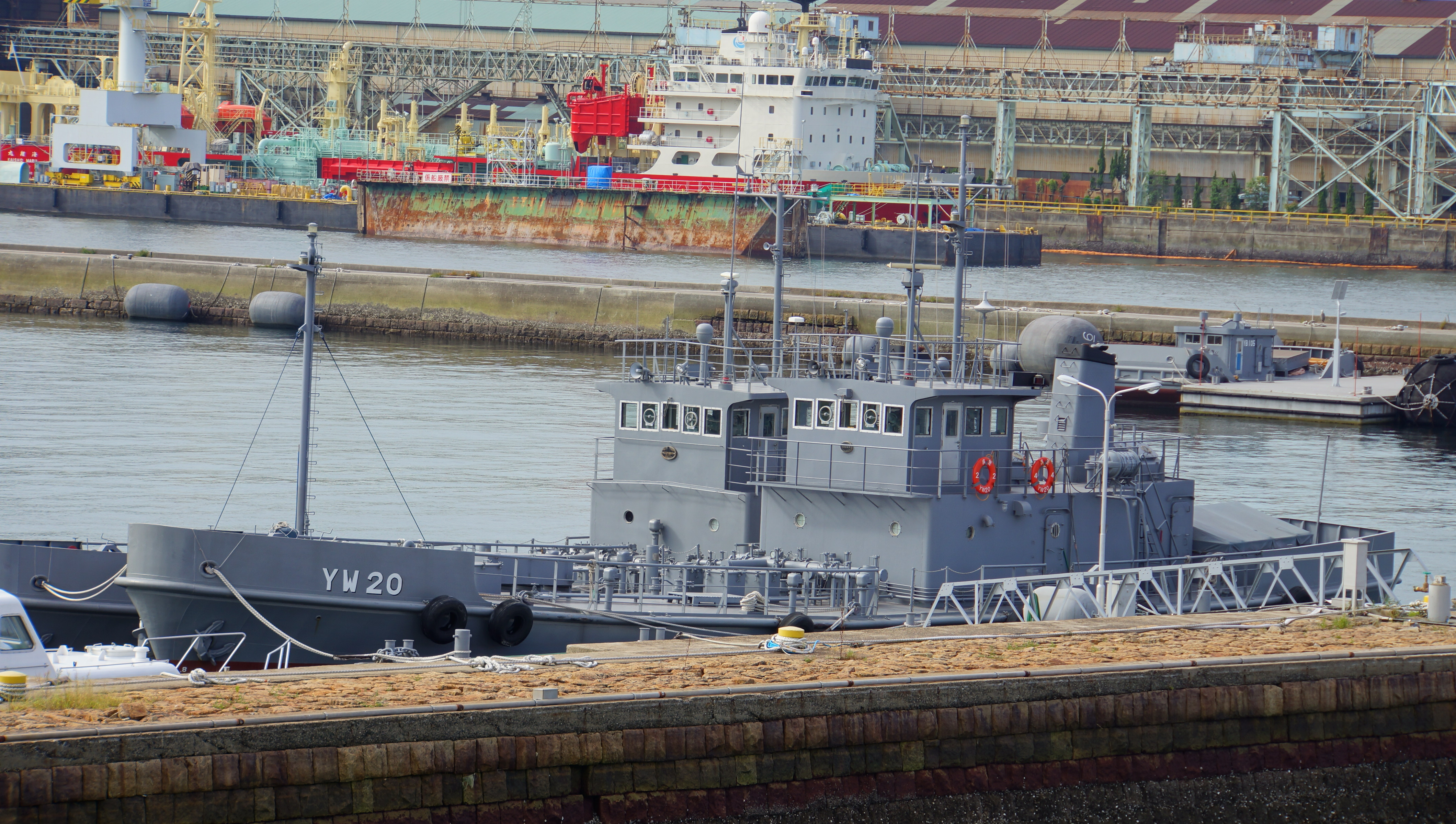 海上自衛隊 水船20号（YW-20）。 14年9月15日 呉基地にて。